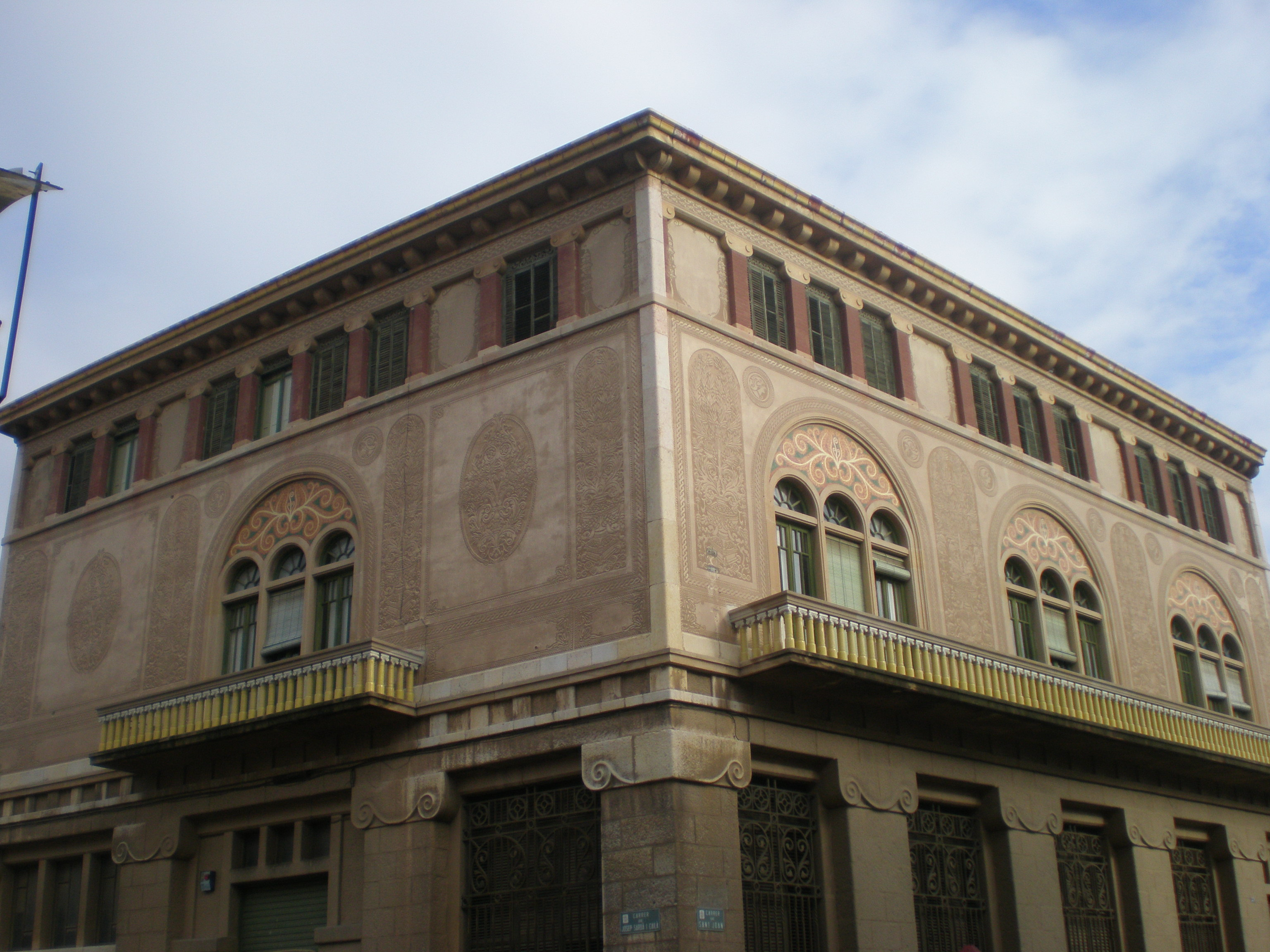 Reus - Casa Gasull. Obra de Lluís Domènech i Montaner del 1911 (Reus-Catalunya)